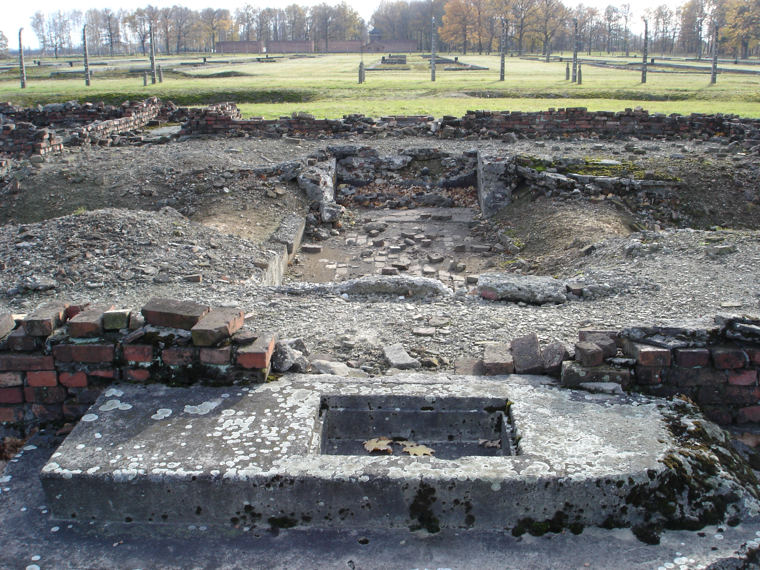 Krematorium IV in Auschwitz Birkenau (Gaskammer im Stammlager als I gezählt)